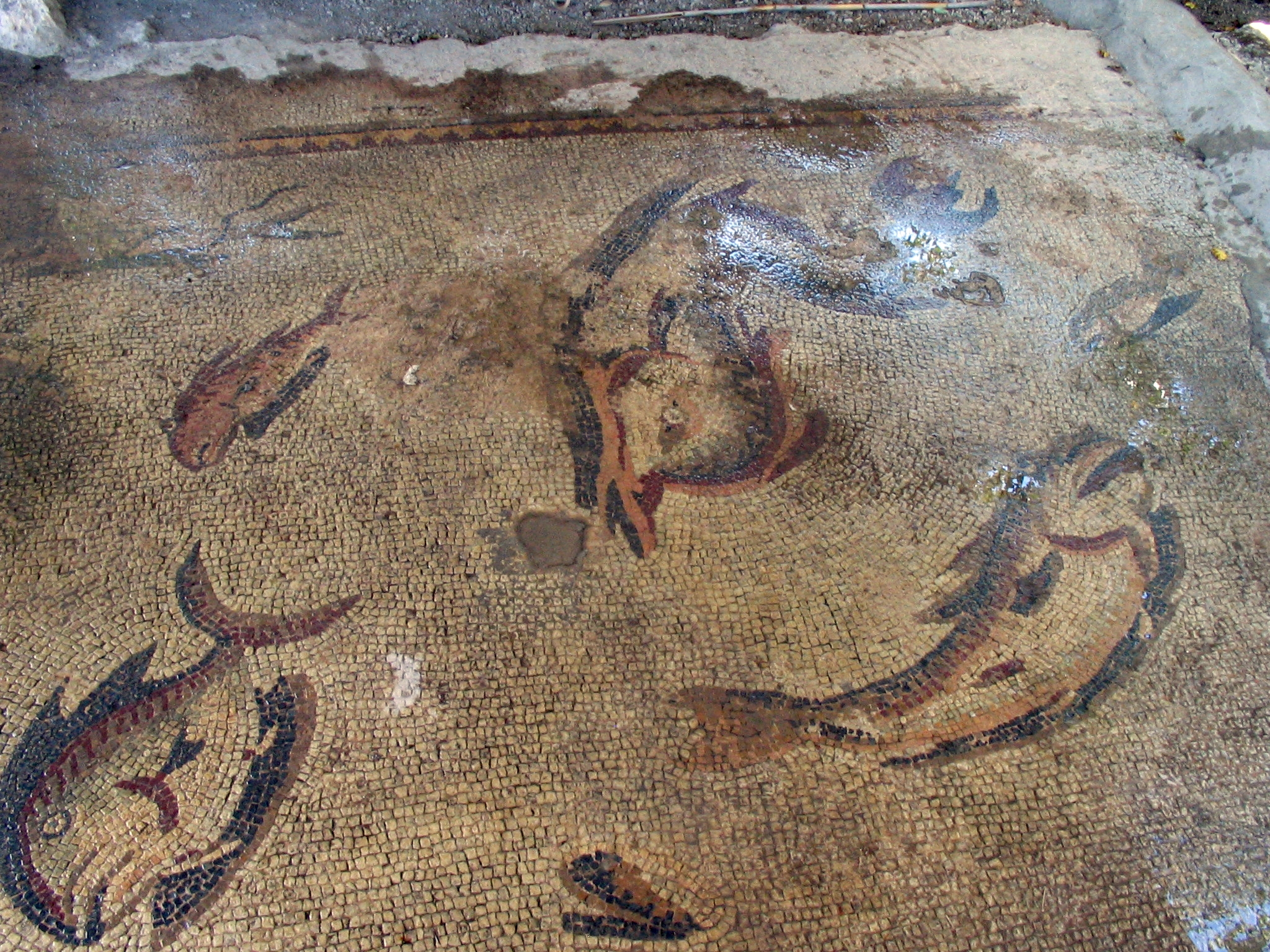 Fischmosaik in Anavarza, Südtürkei